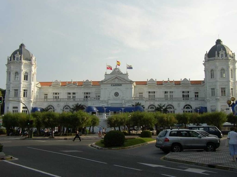 El Casino de Santander.